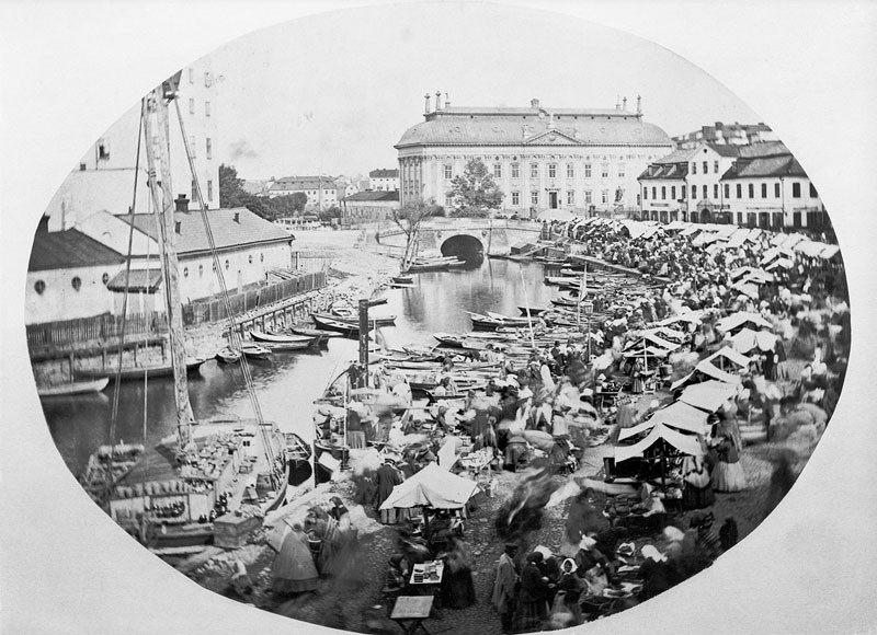 Riddarholmskanalen i Stockholm